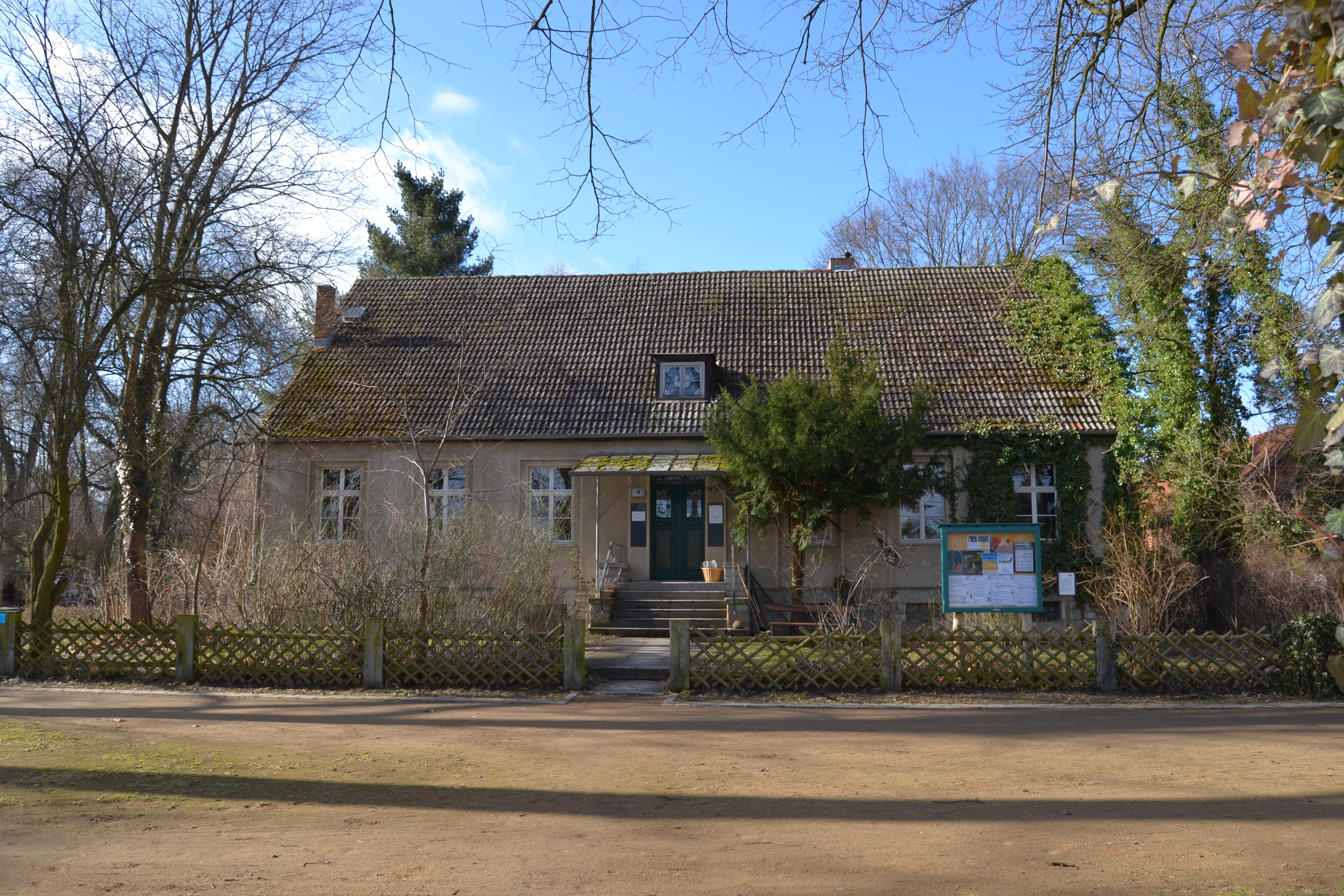 das alte Pfarrhaus von Kleinschönebeck/Schöneiche bei Berlin